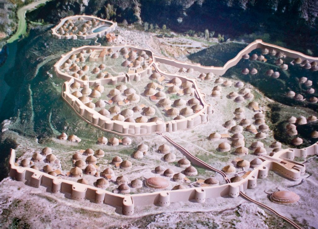 Pintura situada en el centro de recepción de visitantes de los Millares.